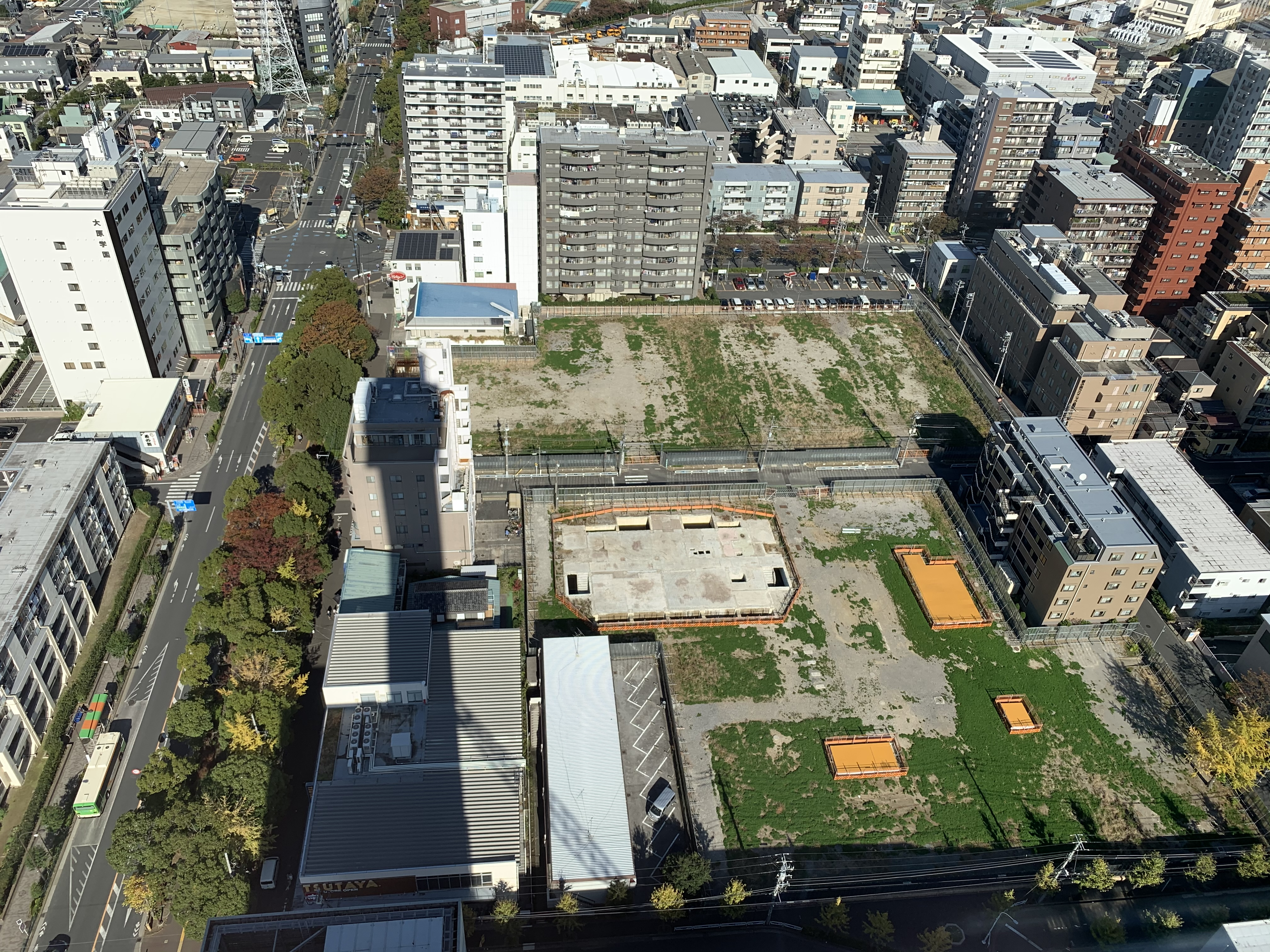 タワーホール船堀展望台から北方の江戸川区役所庁舎移設予定地(船堀4丁目)を望む